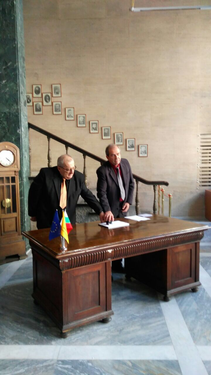 08.08.2017 - Централна Софийска Поща - София, България - моментът на валидацията